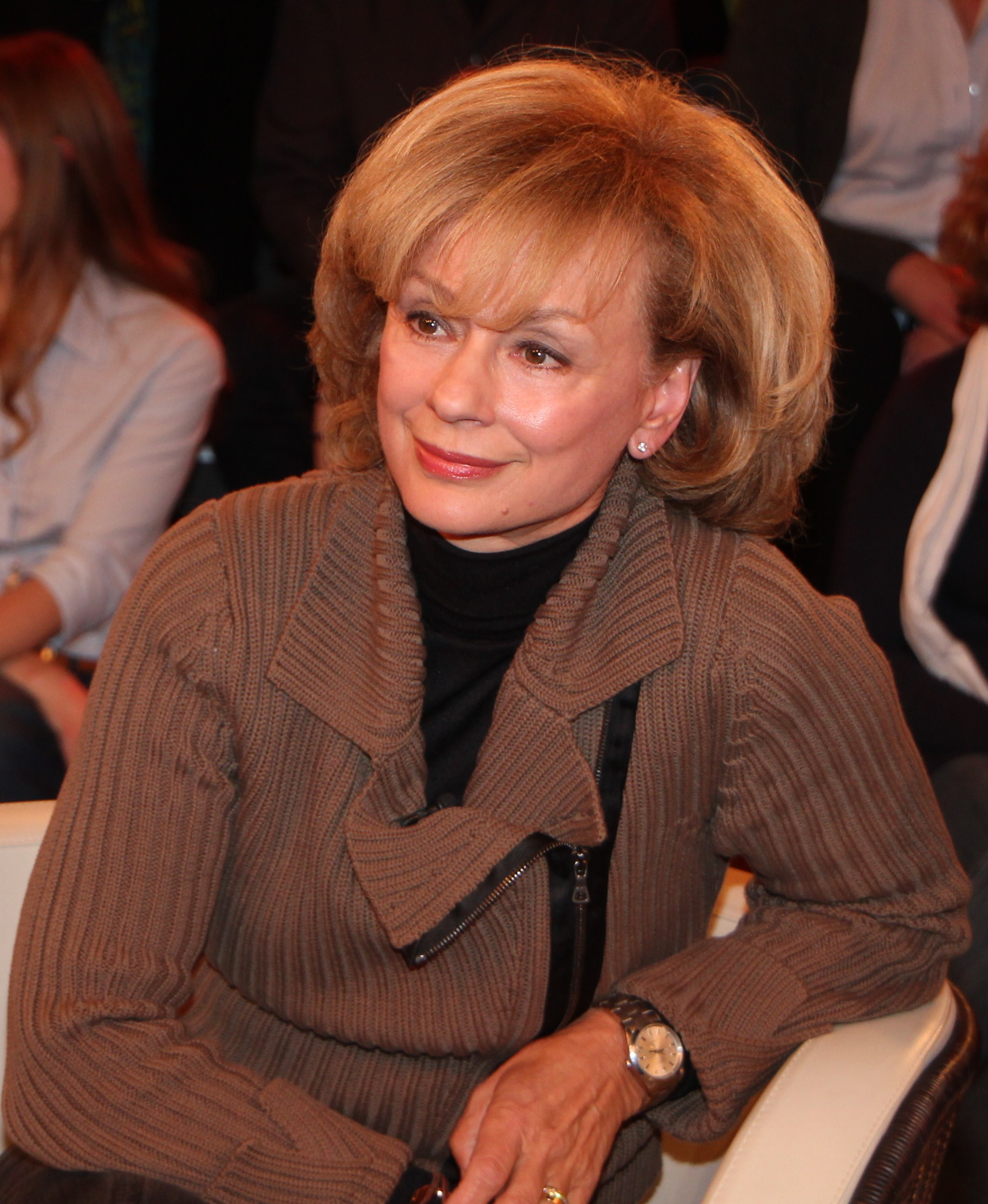 Hiltrud Marion „Hillu“ Schwetje, zwischenzeitlich Hiltrud Schröder, auch Hiltrud Hensen aus erster Ehe (* 11. Dezember 1948 in Hannover als Hiltrud Marion Hampel) war von 1984 bis 1997 in zweiter Ehe mit dem SPD-Politiker und damaligen niedersächsischen Ministerpräsidenten Gerhard Schröder verheiratet.